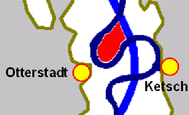 Schematische Karte der Kollerinsel